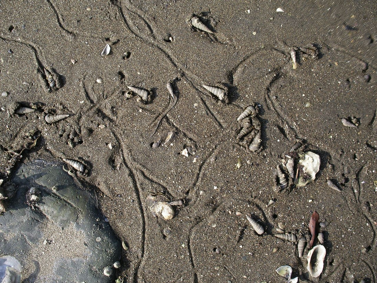 ヘナタリとその這い跡。一回り小さいのはホソウミニナとウミニナ。長崎市にて( Pirenella cingulata (Gmelin, 1791) (synonym: Pirenella nipponica, Batillaria cumingii, B. multiformis, Nagasaki)